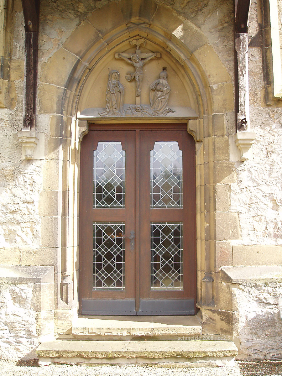 Cornelienkirche in Bad Wimpfen, Westportal